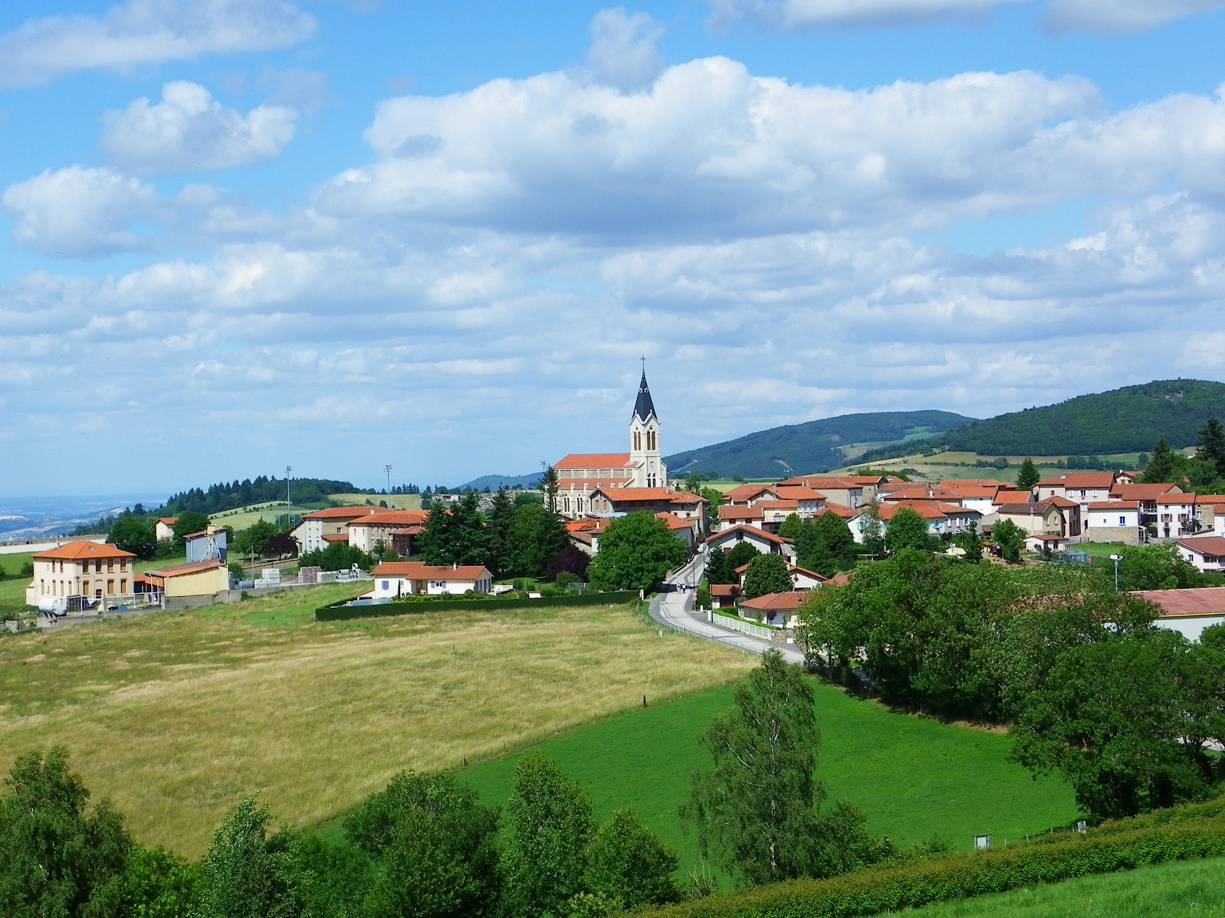 Vue du village d'Aveize vu du Sud-Est